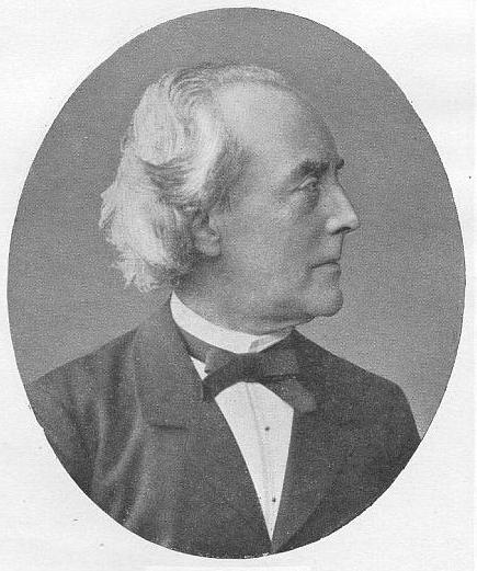 Ernst Curtius (1814–1896), deutscher Altertumswissenschaftler. Originalphotographie